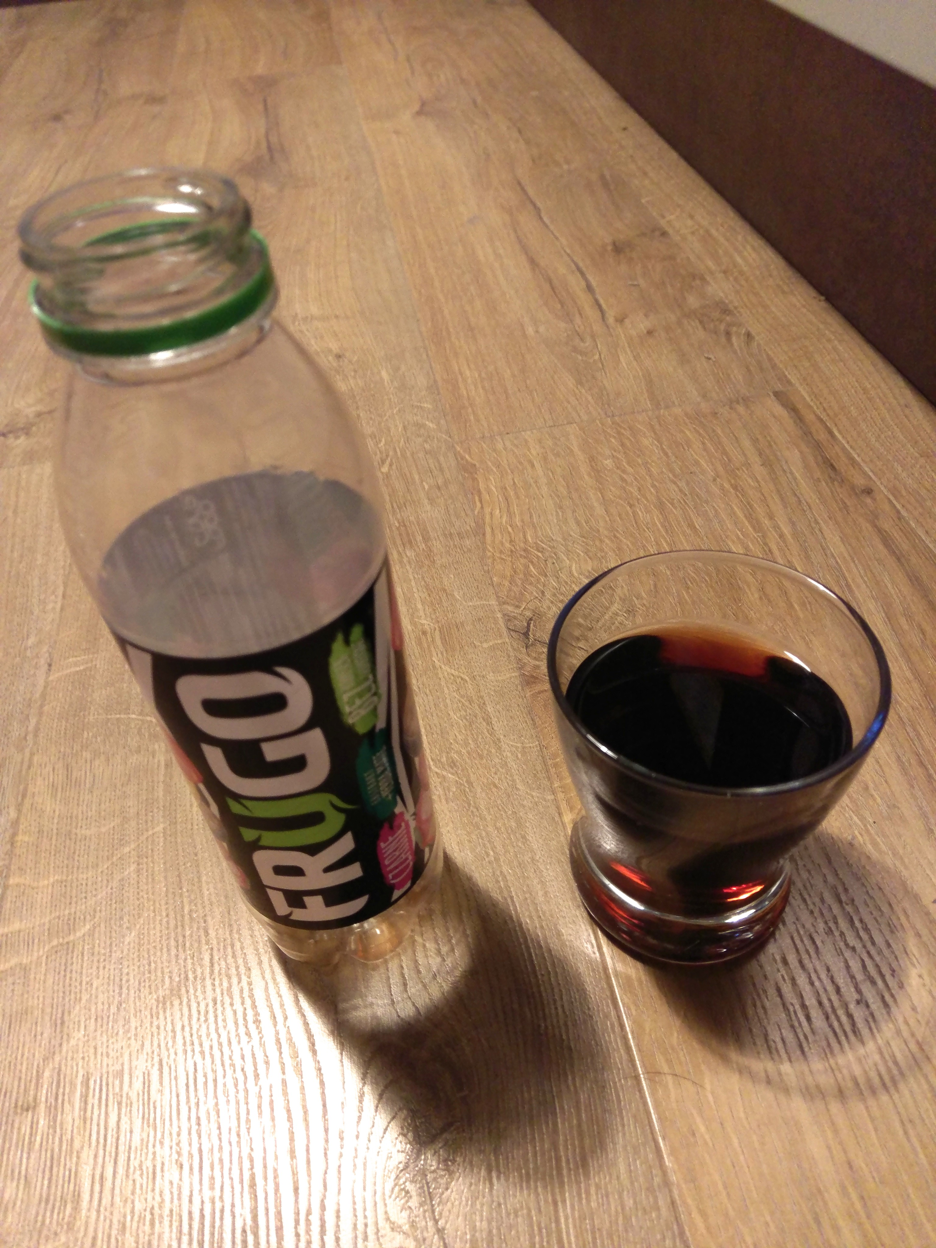 Butelka po frugo czarnym, i samo frugo czarne w szklance